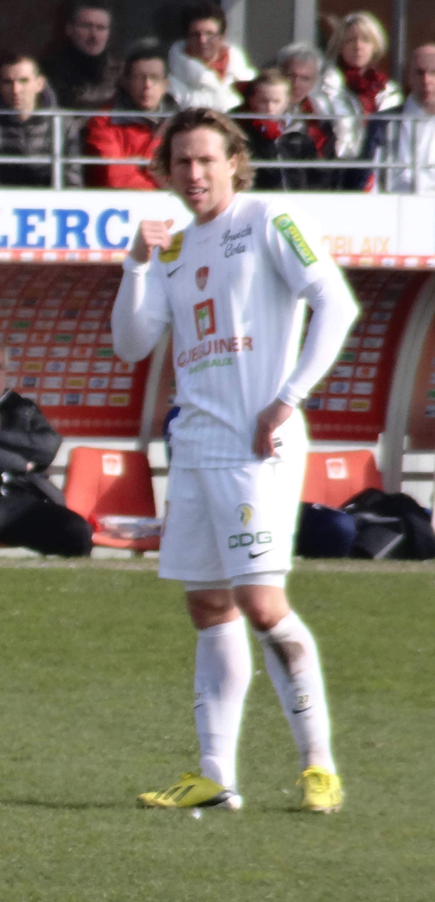 Match de football (Ligue 1) entre le Stade brestois 29 et l'Olympique lyonnais, le 3 mars 2013